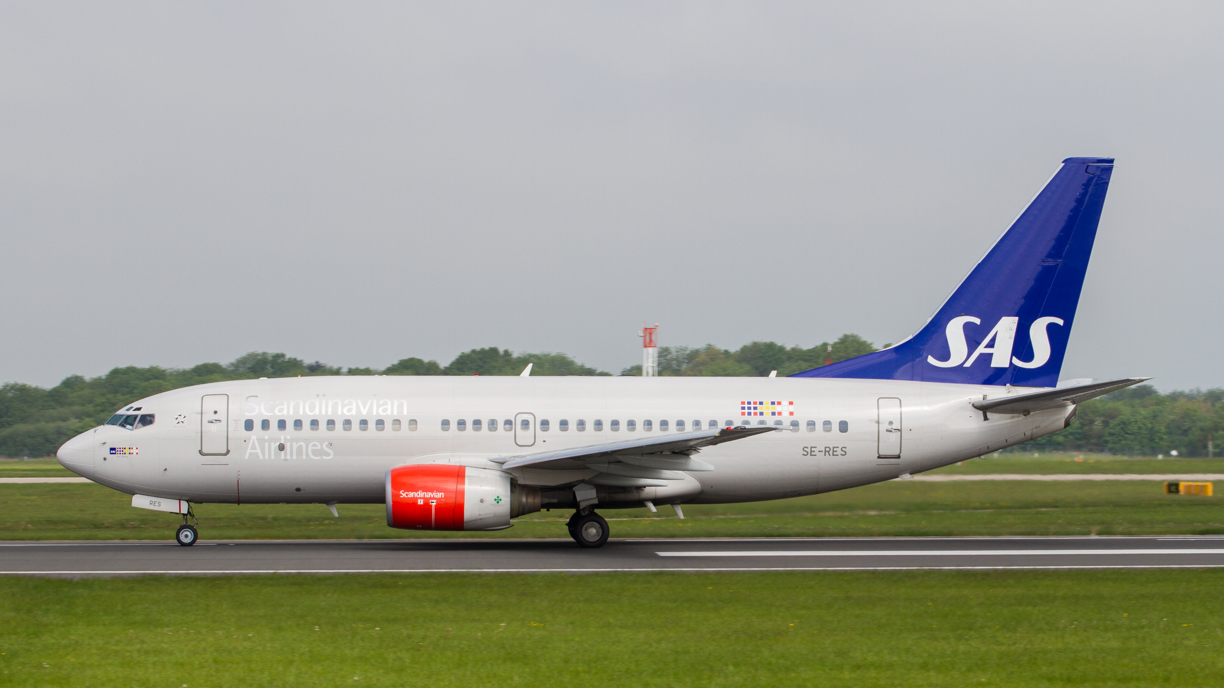 Manchester 31.05.13.